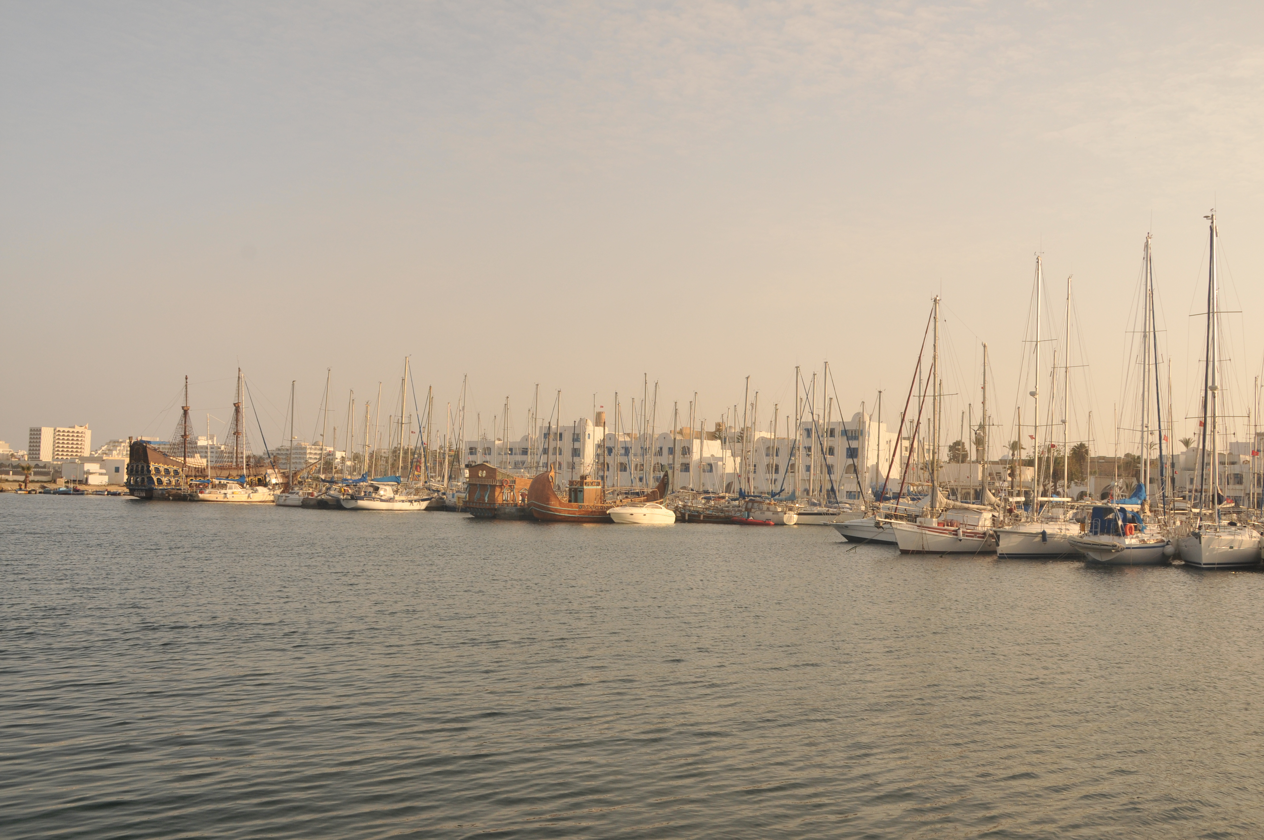 Port de Plaisance de Monastir, Tunisie